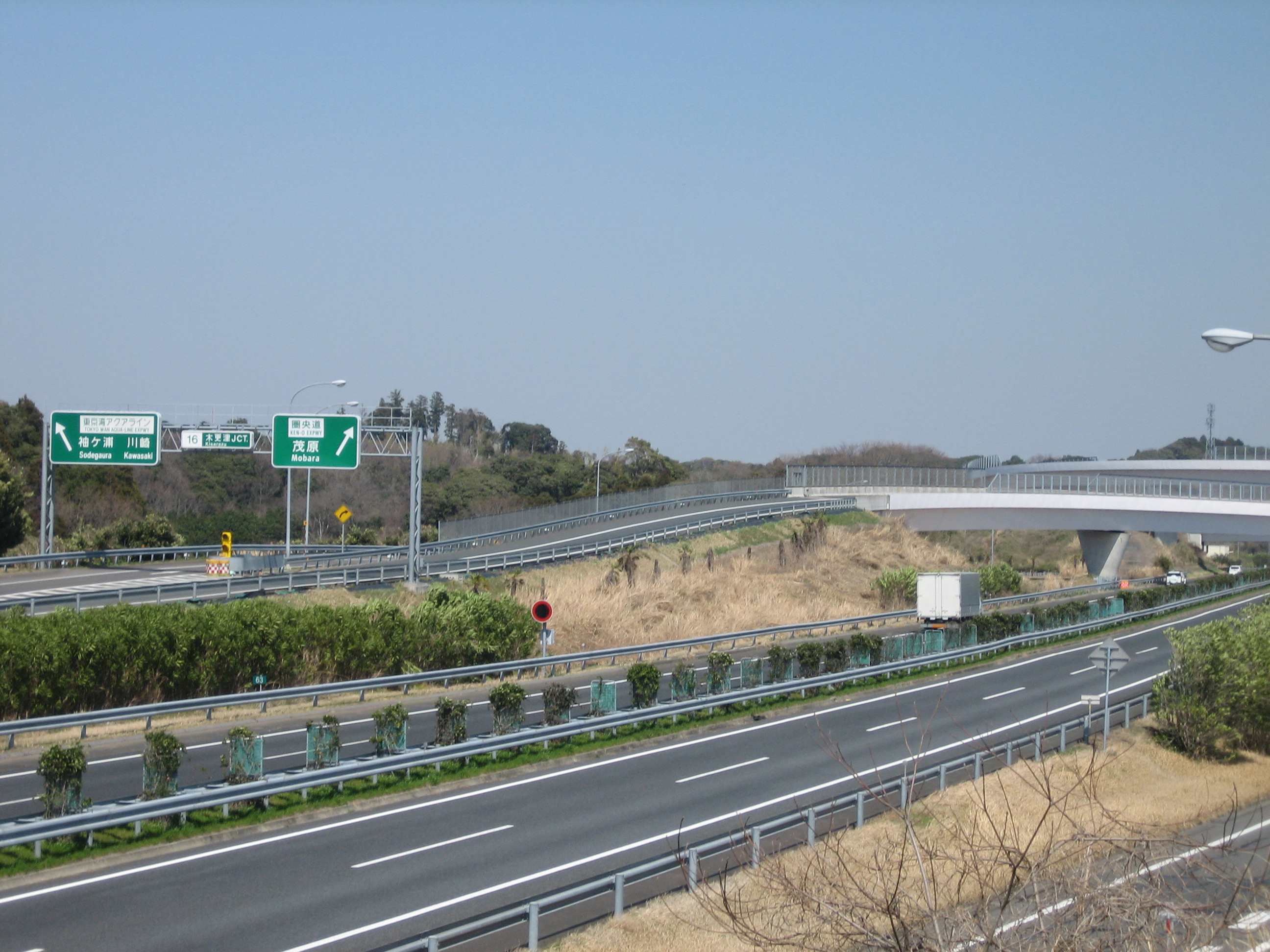 木更津JCT。館山道、圏央道、東京湾アクアラインが連絡する。